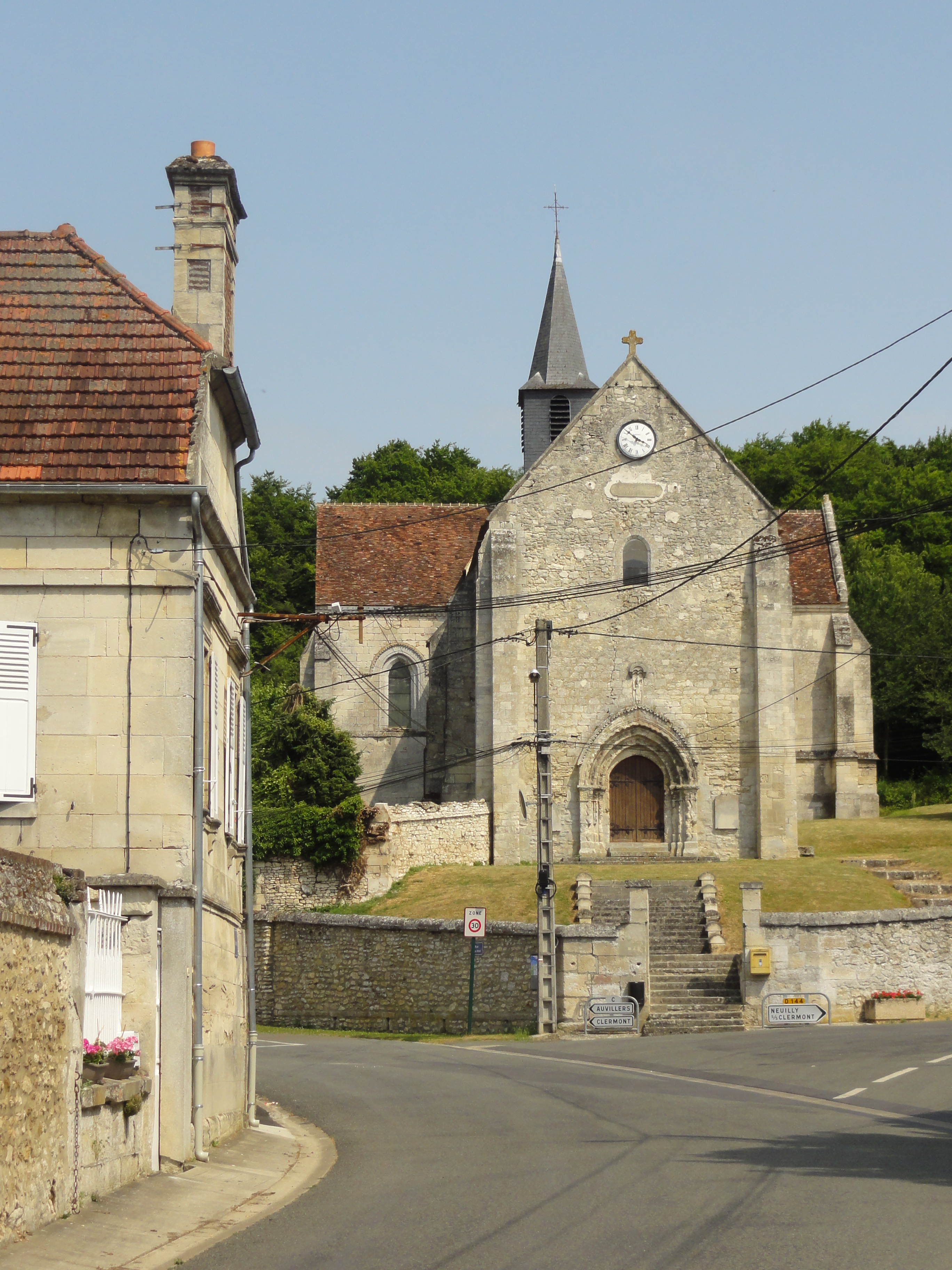 Église Saint-Lucien d'Ansacq (voir titre).